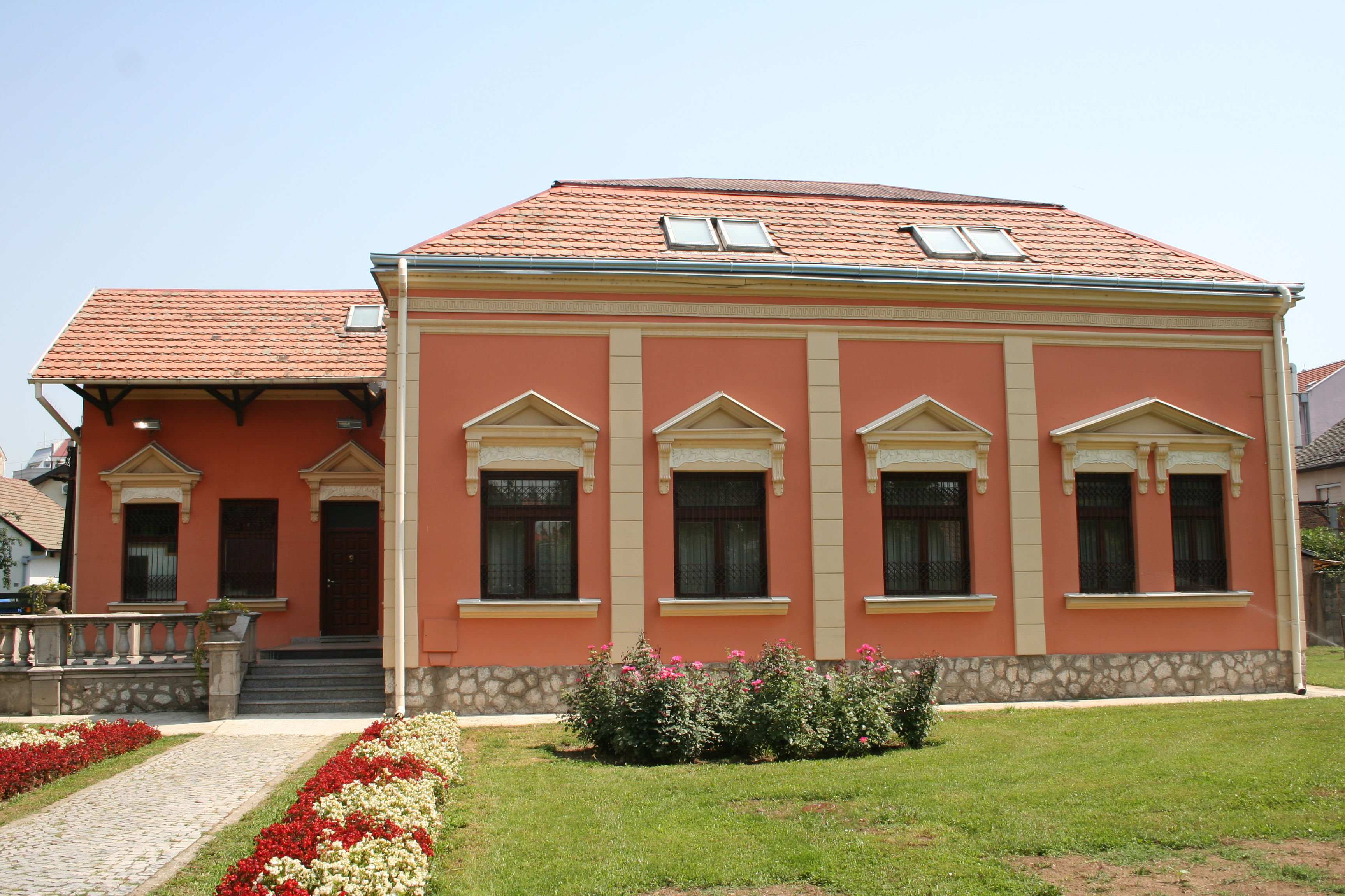 Dunjića kuća, Šabac